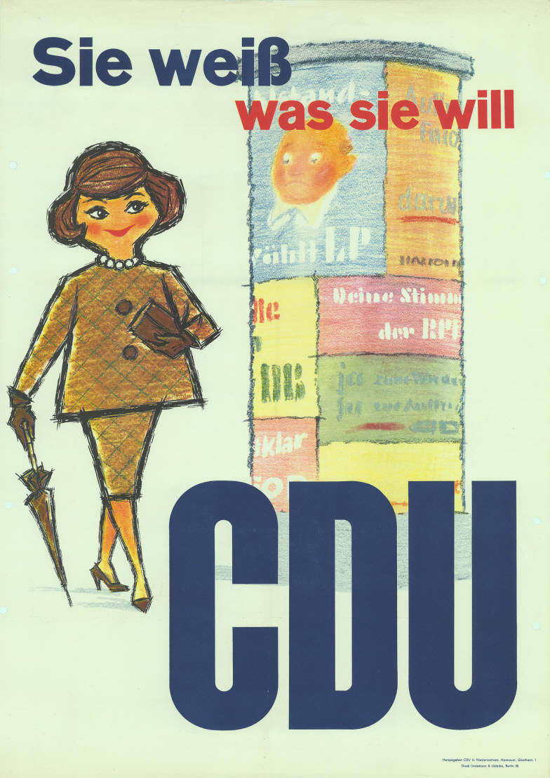 Sie weiß was sie will CDU Abbildung: Die moderne Frau informiert sich über die politischen Parteien - Litfaßsäule (Comics) Kommentar: Das Plakat gab es auch als Postkarte. Plakatart: Motiv-/Textplakat Auftraggeber: CDU in Niedersachsen, Hannover Drucker_Druckart_Druckort: Lindemann & Lüdecke, Berlin Objekt-Signatur: 10-008 : 208 Bestand: Landtagswahlplakate Niedersachsen (10-008) GliederungBestand10-18: Landtagswahlplakate Niedersachsen (10-008) » CDU Lizenz: KAS/ACDP 10-008 : 208 CC-BY-SA 3.0 DE